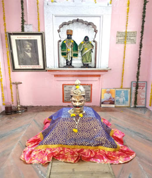 संतजी महाराज-जगन्नाडे-महाराज-समाधि-मंदिर-सुदुम्बारे